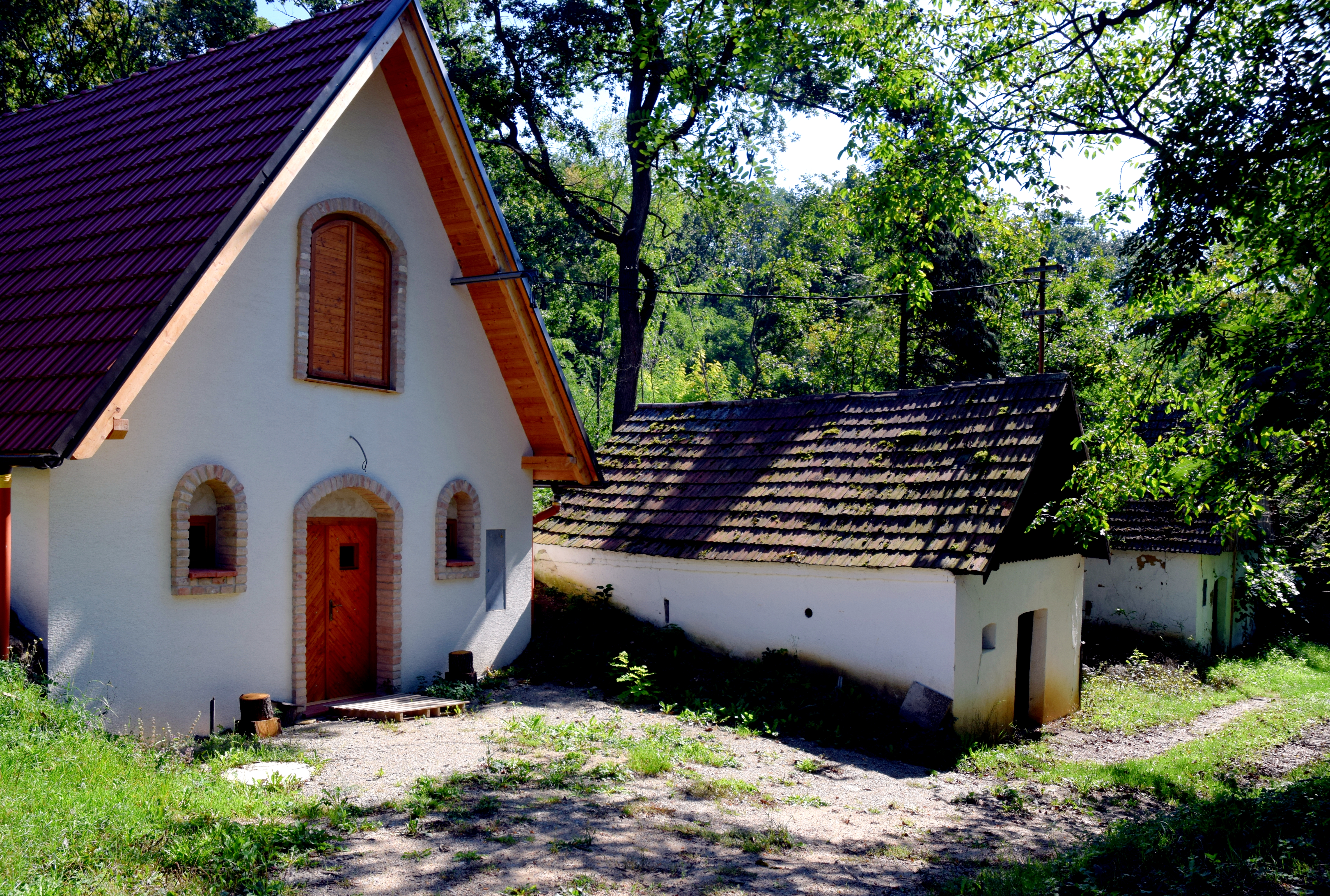 Kellergasse Neuberg in der KG Zlabern in Neudorf bei Staatz